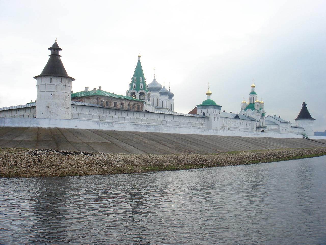 Ансамбль Макарьевского Желтоводского монастыря на Волге (Нижегородская область, Лысково, рп Макарьево)